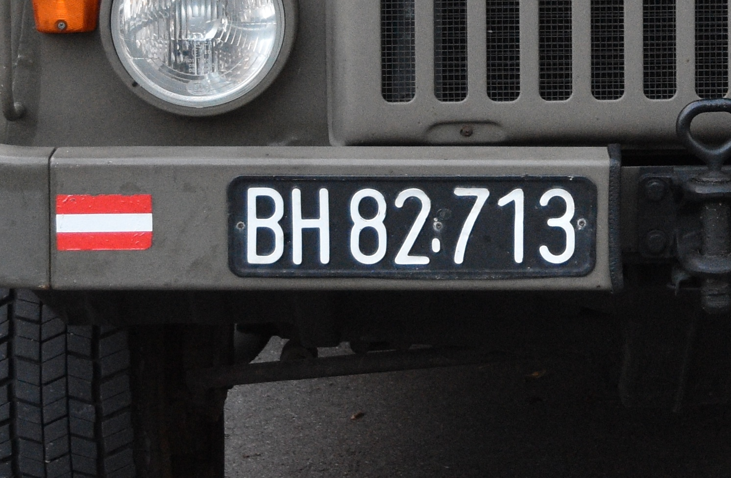 Military license plates in Austria